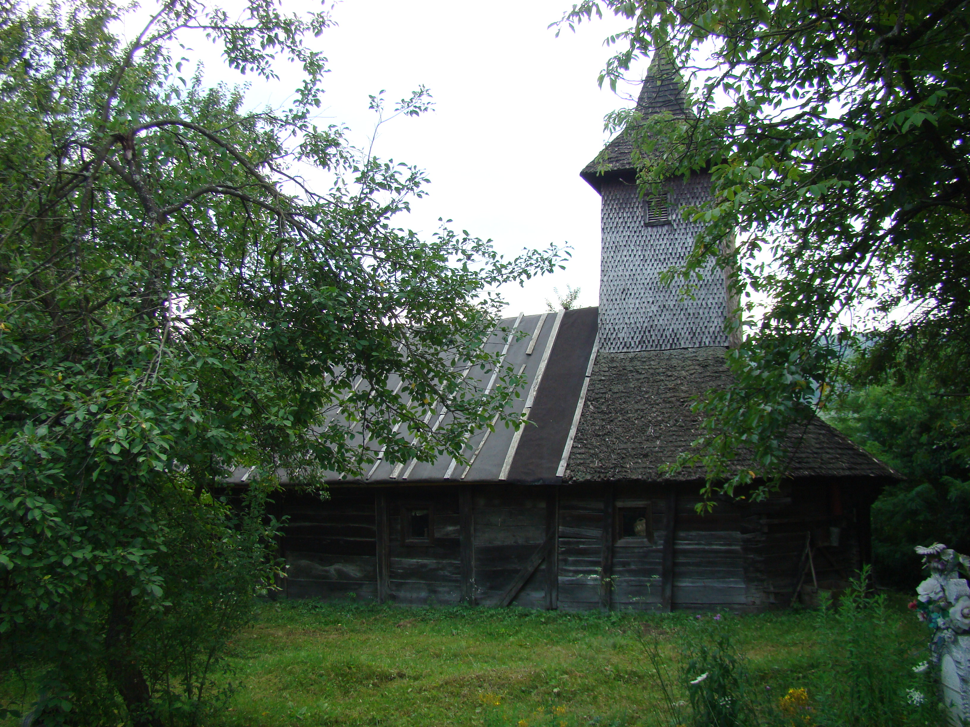 Biserica de lemn din Crivina de Sus-Timiș